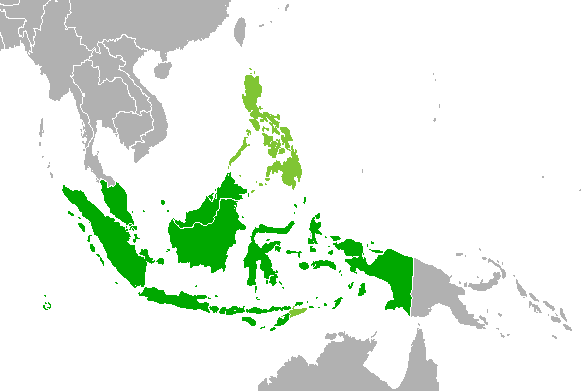 Idioma malayo-indonesio